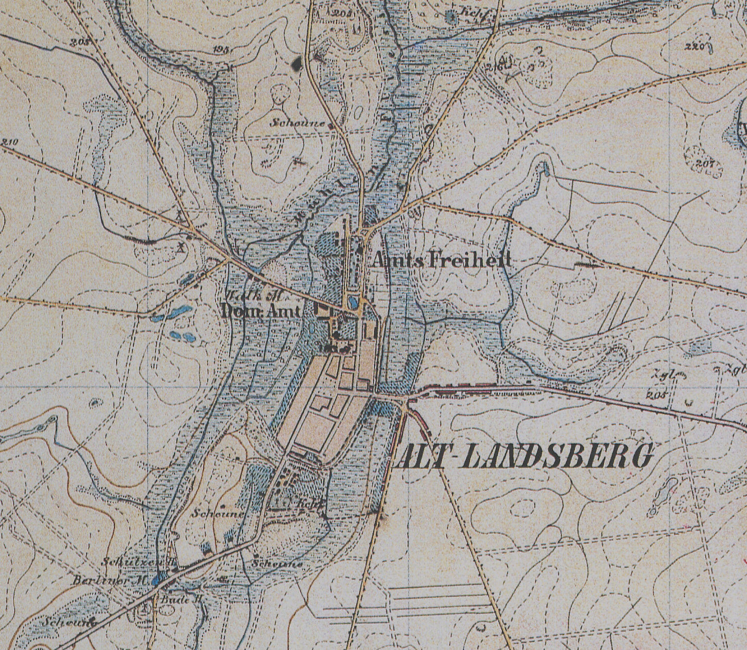 Altlandsberg, Landkreis Märkisch-Oderland, Brandenburg, Ausschnitt aus dem Messtischblatt 3448 Altlandsberg von 1871